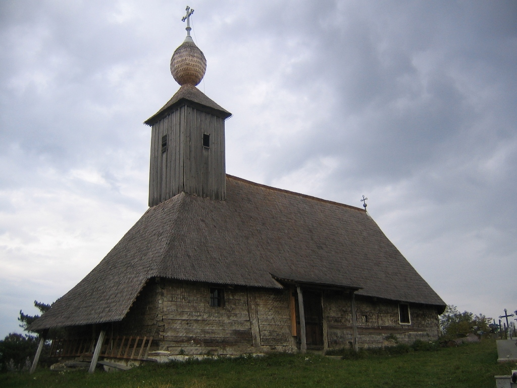 Biserica din lemn "Naşterea Sf. Ioan Botezătorul" de la Româneşti, Timiş (secolul XVI)